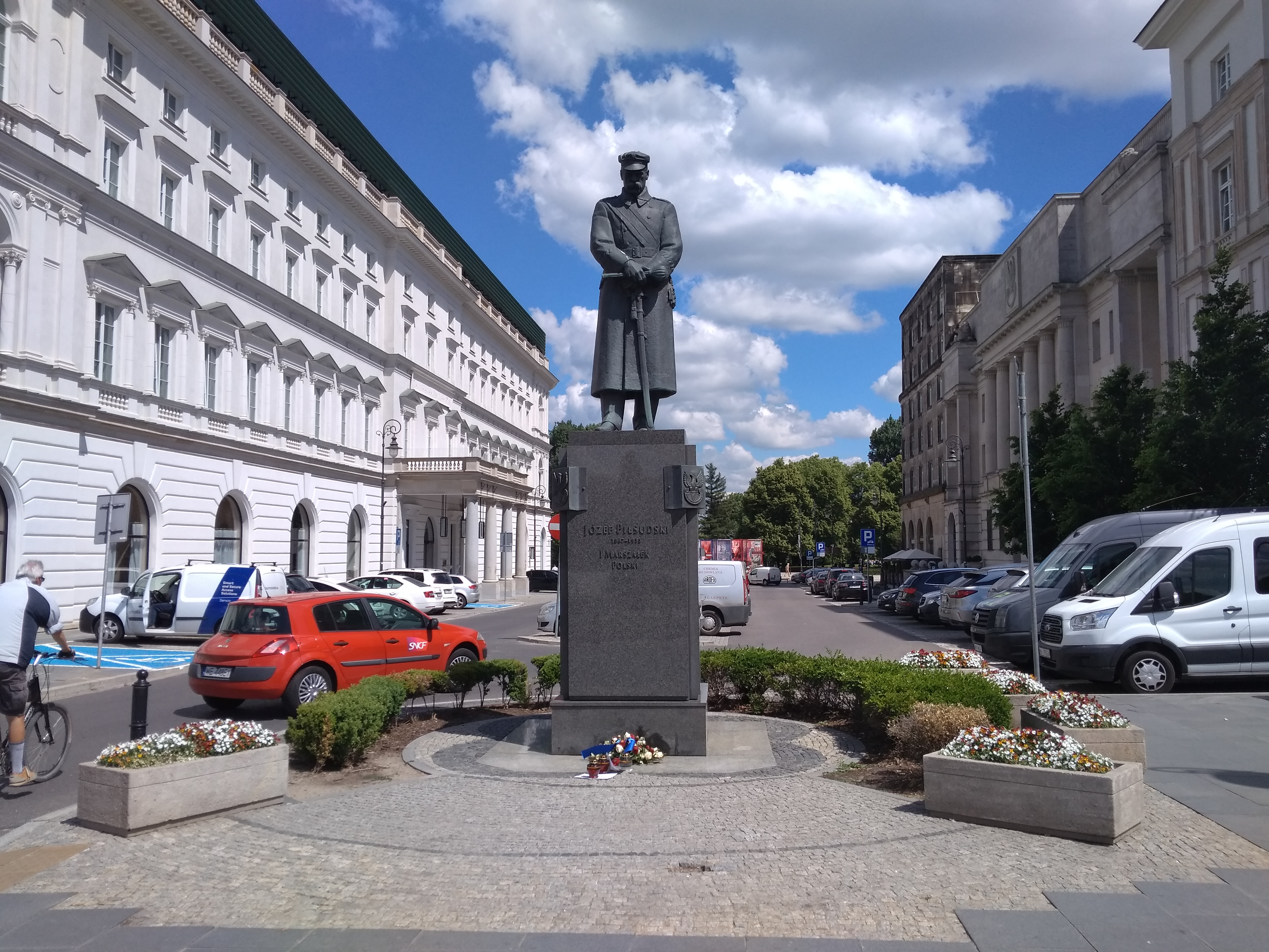 Pomnik Józefa Piłsudskiego na placu tego samego patrona w Warszawie